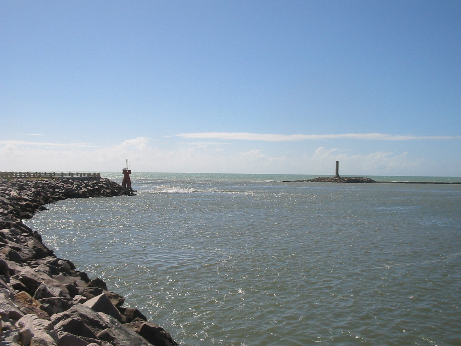 Natal (Rio Grande do Norte), Brasil. Quebra-mar na Foz do Rio Potengi. Breakwater, Potengi River. Natal (Rio Grande do Norte), Brazil.